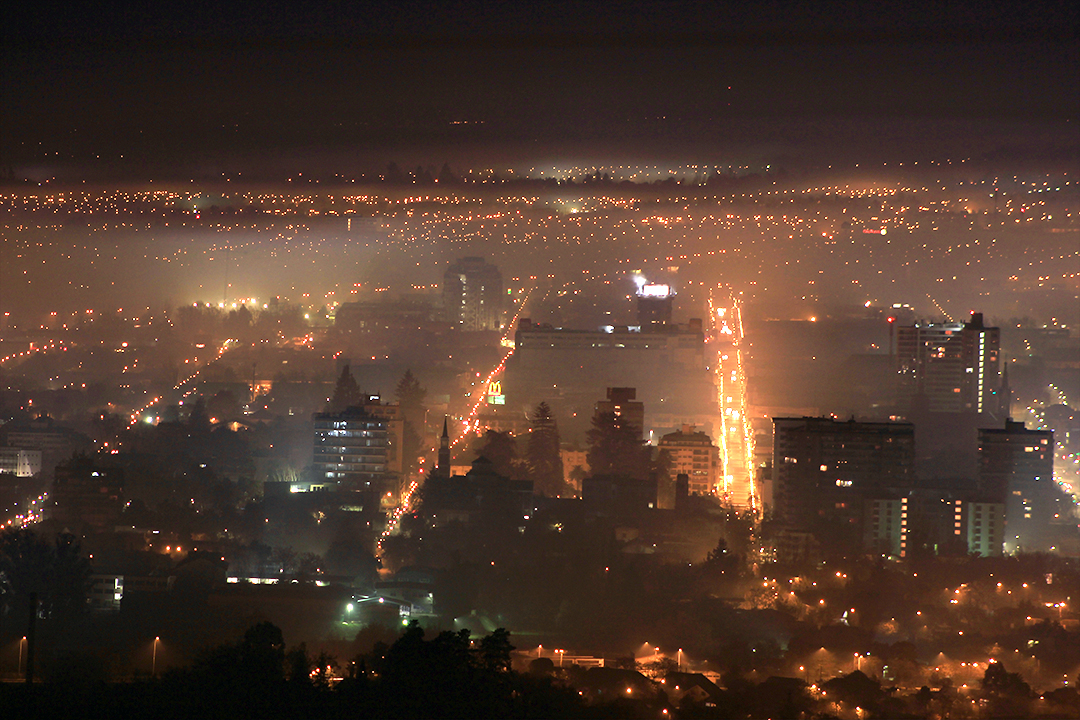 Talca de noche, vista desde el cerro La Virgen